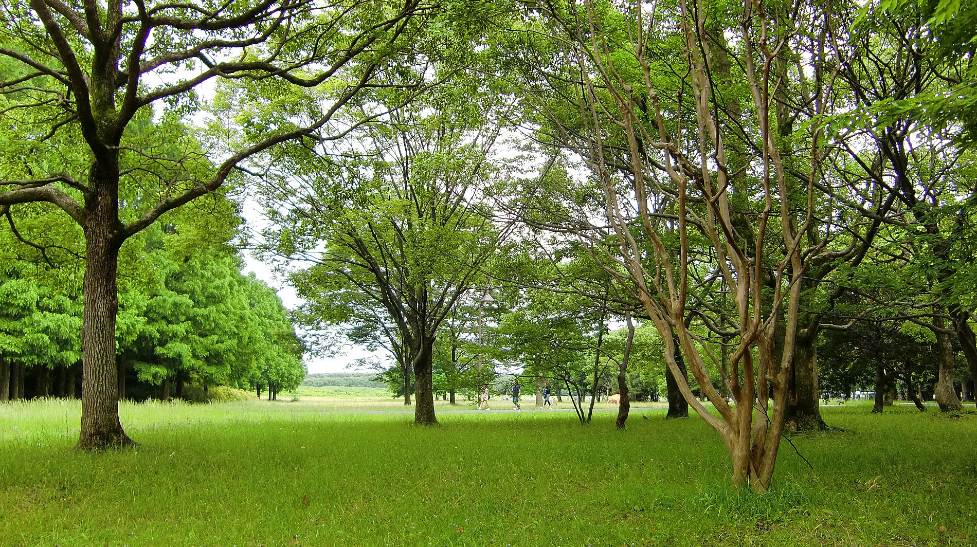 豊かで美しい緑の情景